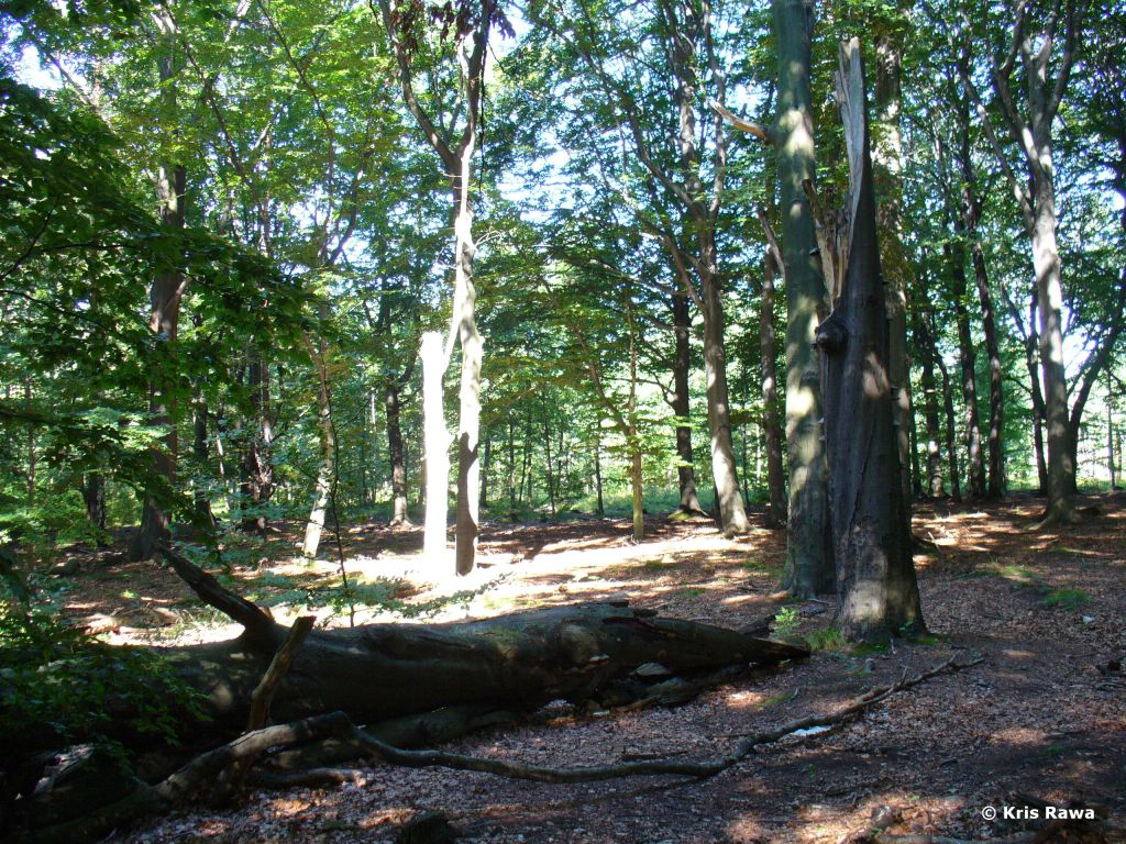 Uroczysko Buczyna